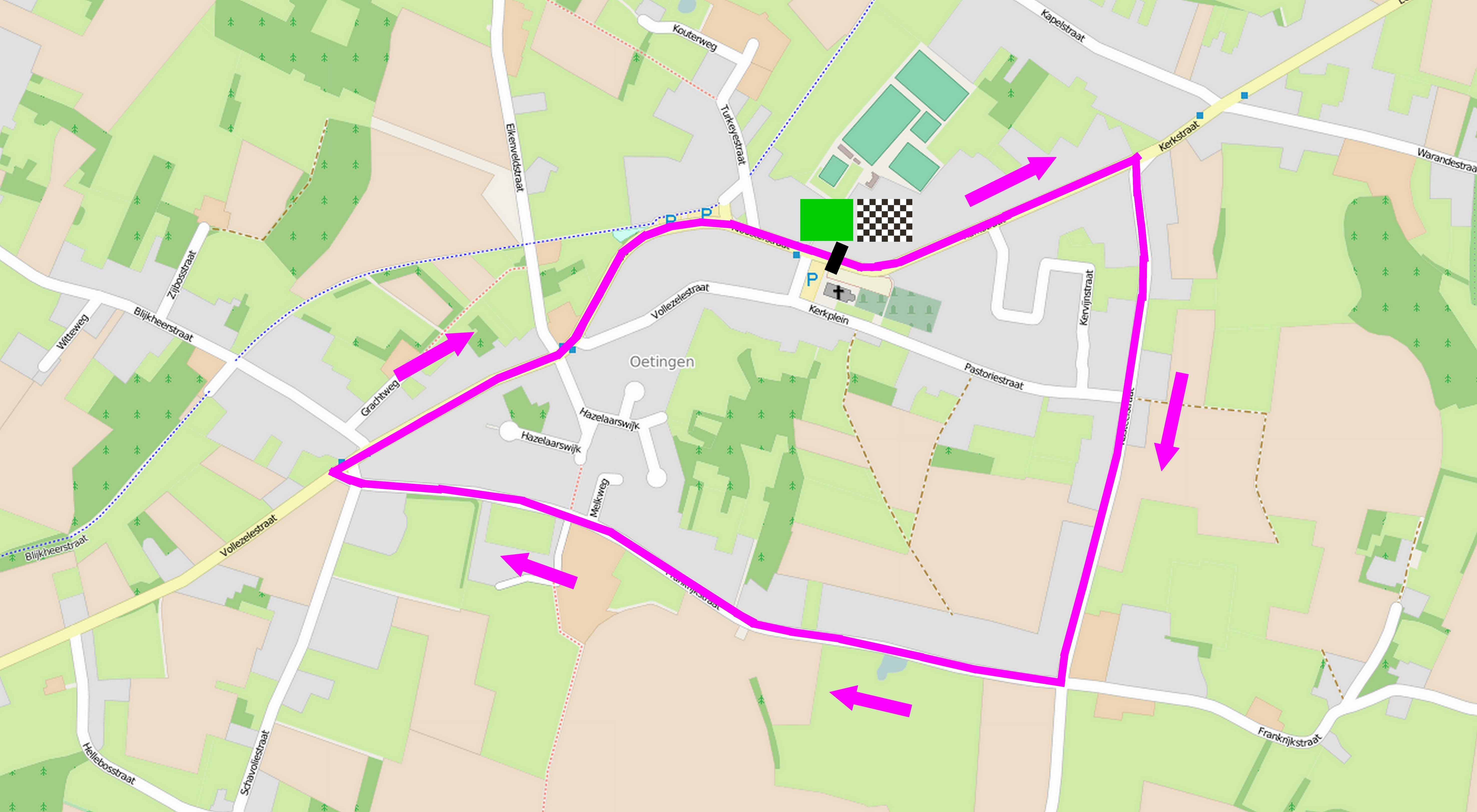 Reportage photographique réalisé le mercredi 25 juin à l'occasion du départ et de l'arrivée de l'Internationale Wielertrofee Jong Maar Moedig 2014 à Oetingen (Gooik), Belgique.